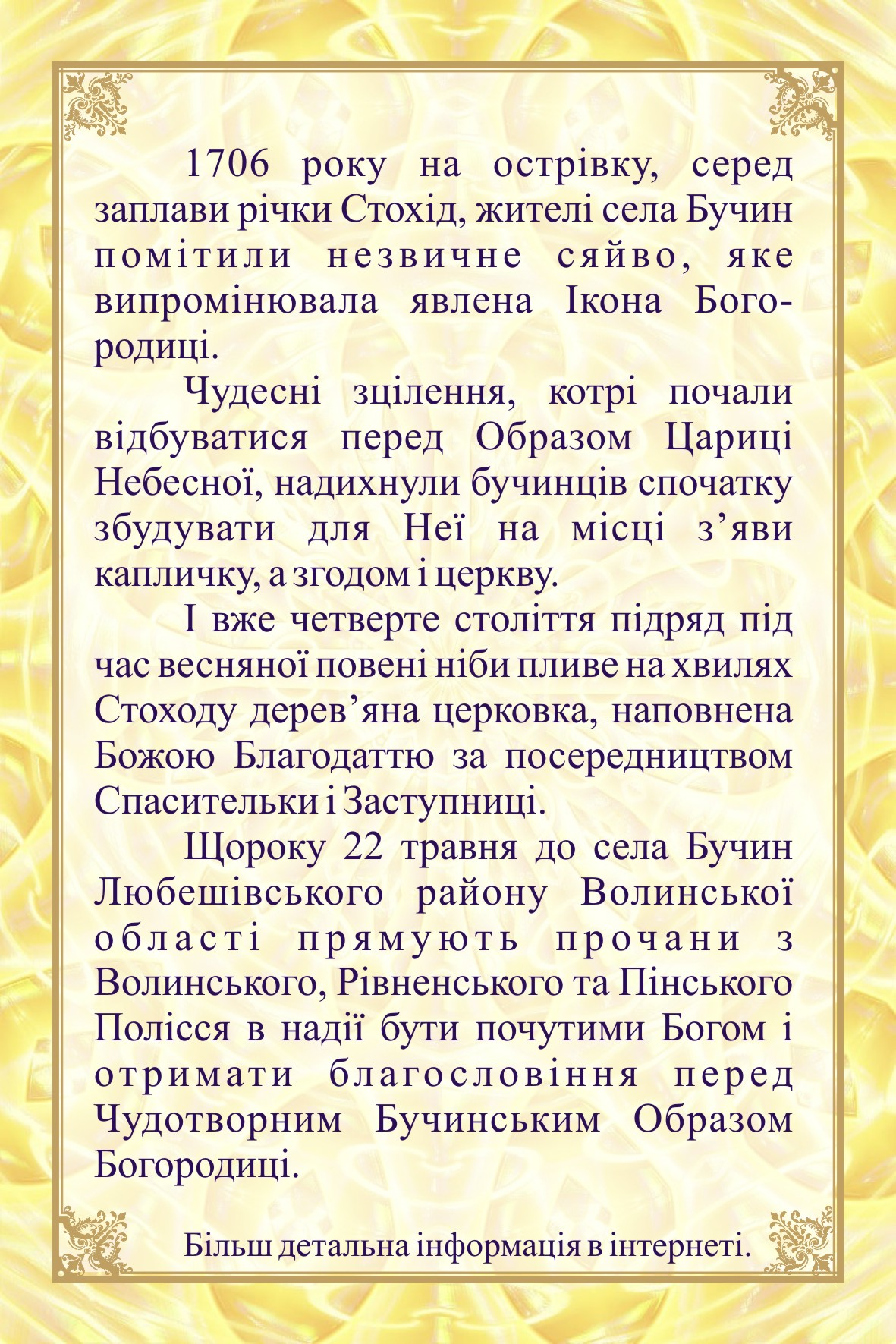 Зворотня сторона Бучинської іконки